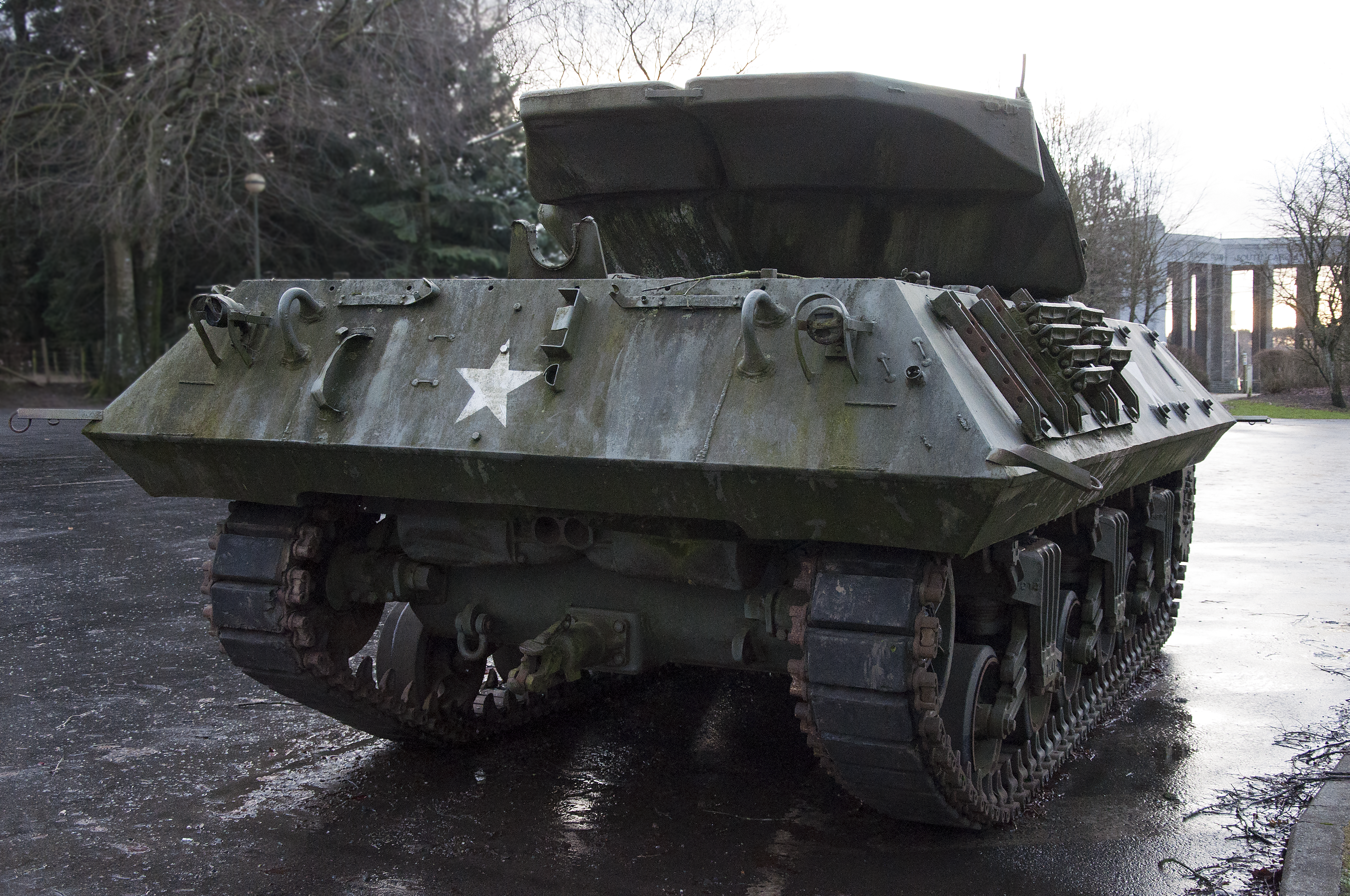 M10 Wolverine Achilles bij het Bastogne Historical Center, Bastogne, België